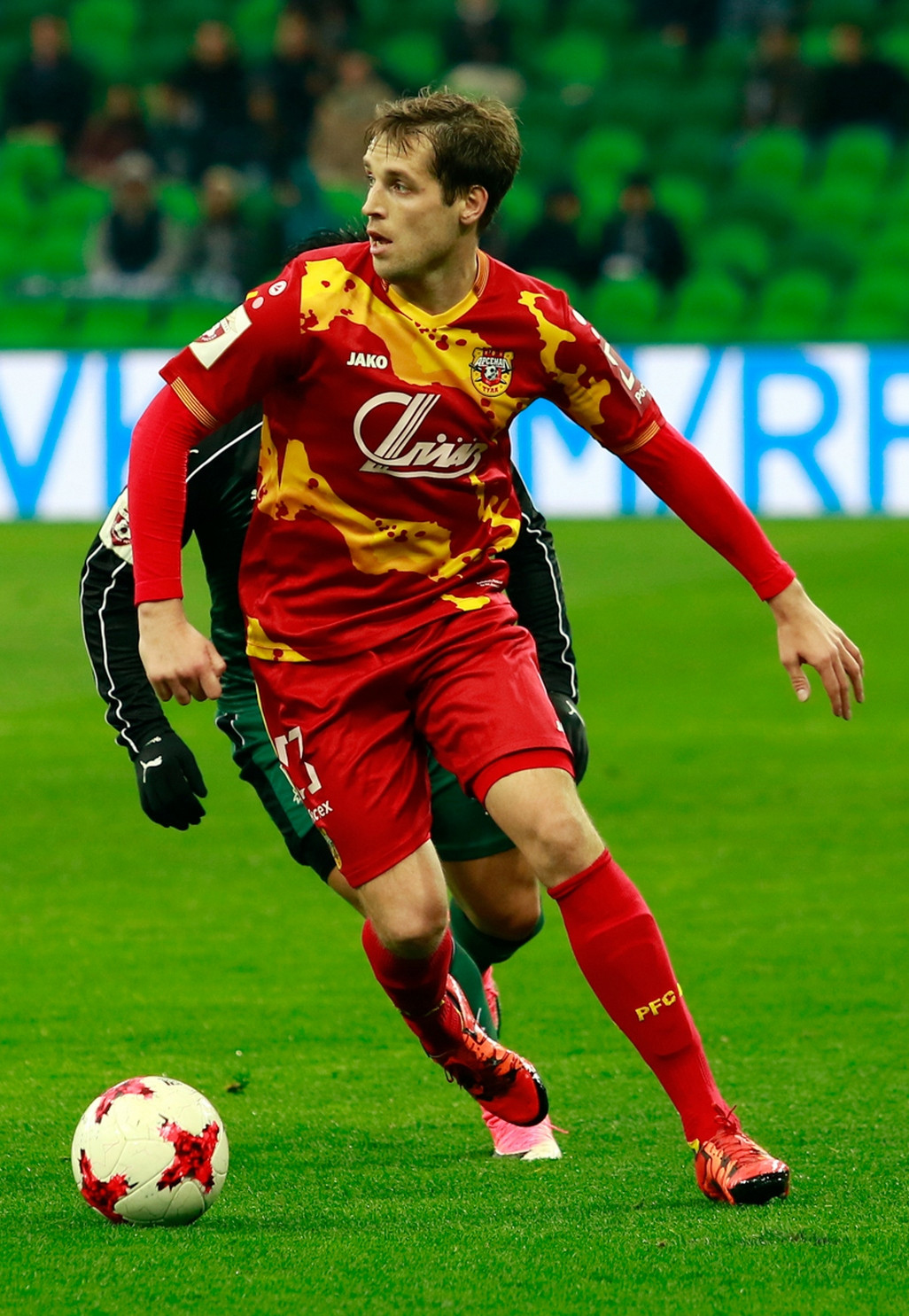 «Краснодар» - «Арсенал»